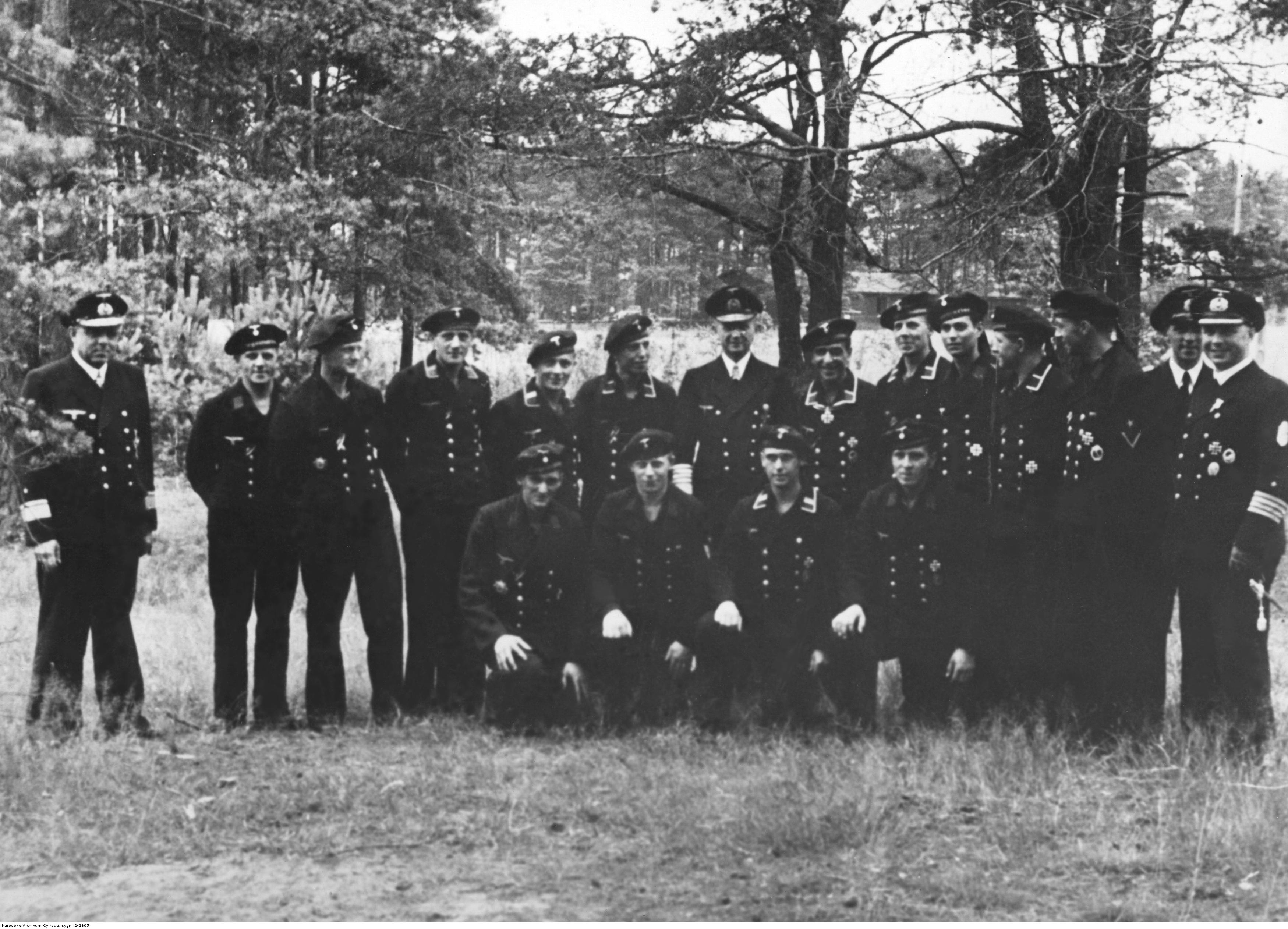 Admirał Karl Donitz (siódmy z lewej w drugim rzędzie) i admirał Hellmuth Heye (pierwszy z lewej w drugim rzędzie) w otoczeniu marynarzy niemieckiej marynarki wojennej (w tym kaprala Walthera Gerholda) - pilotów jednoosobowych łodzi topredowych. Fotografia grupowa.